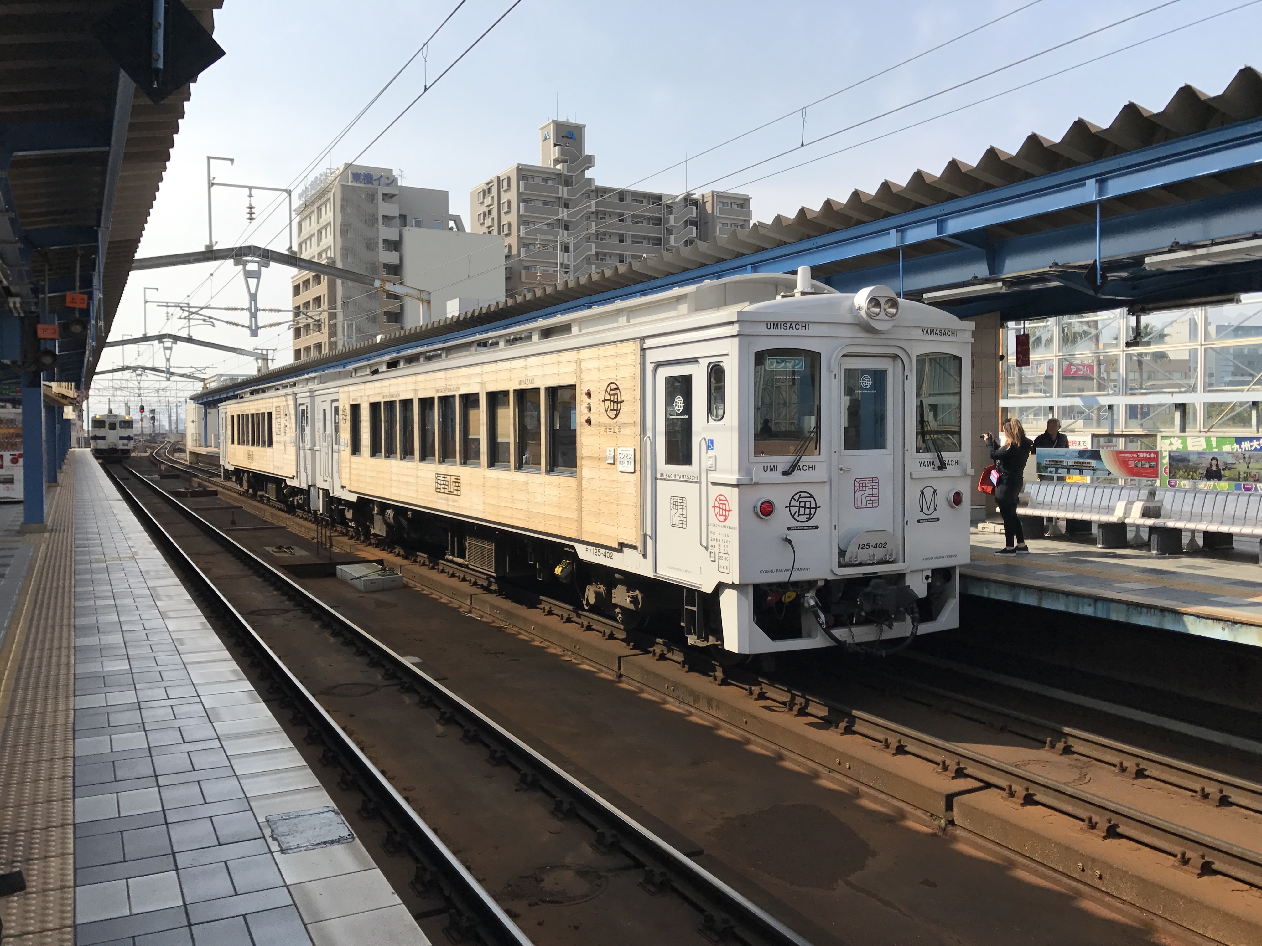 宮崎駅から発車する前の特急「海幸山幸」